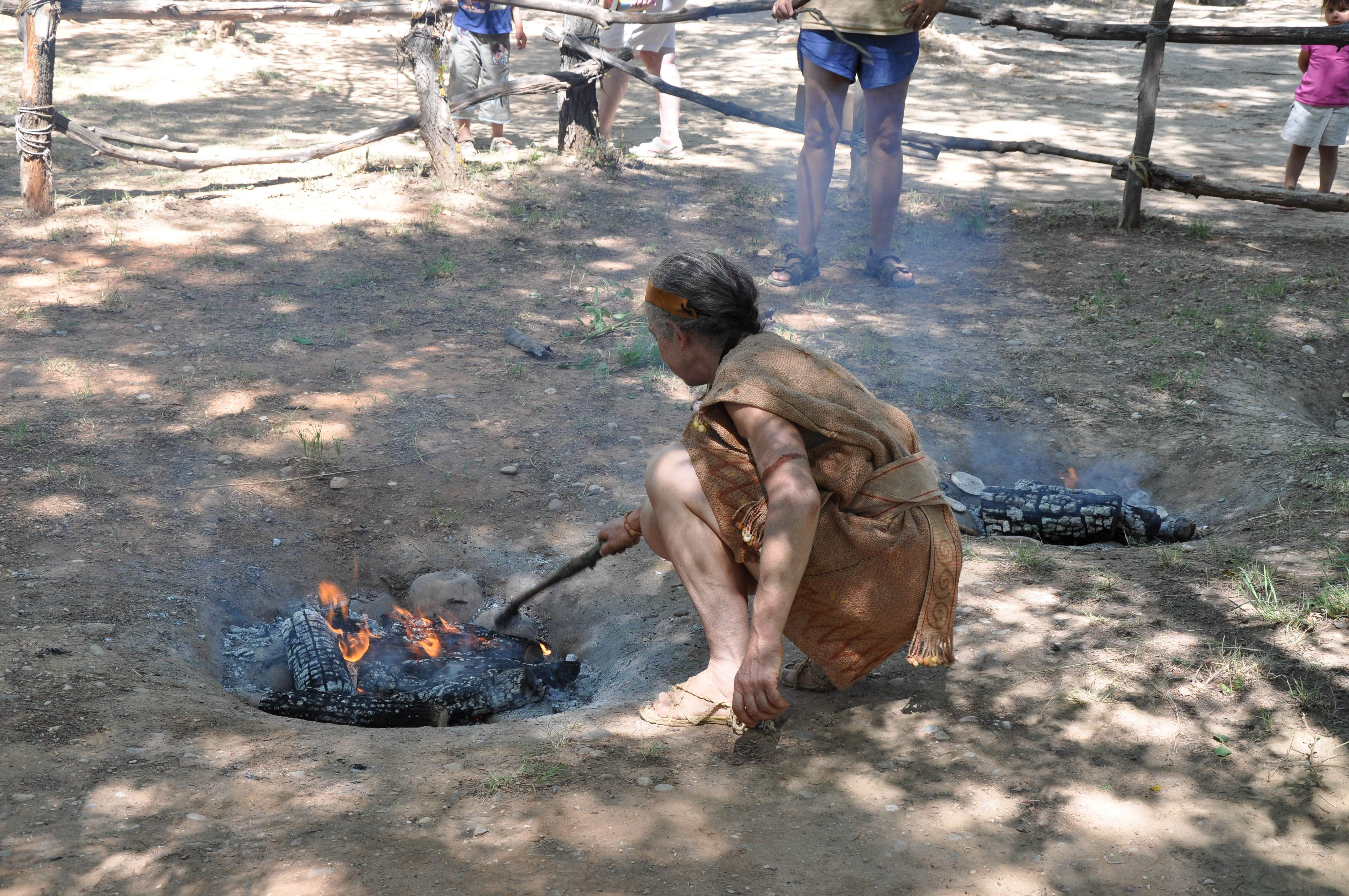 Quinson journée de la préhistoire